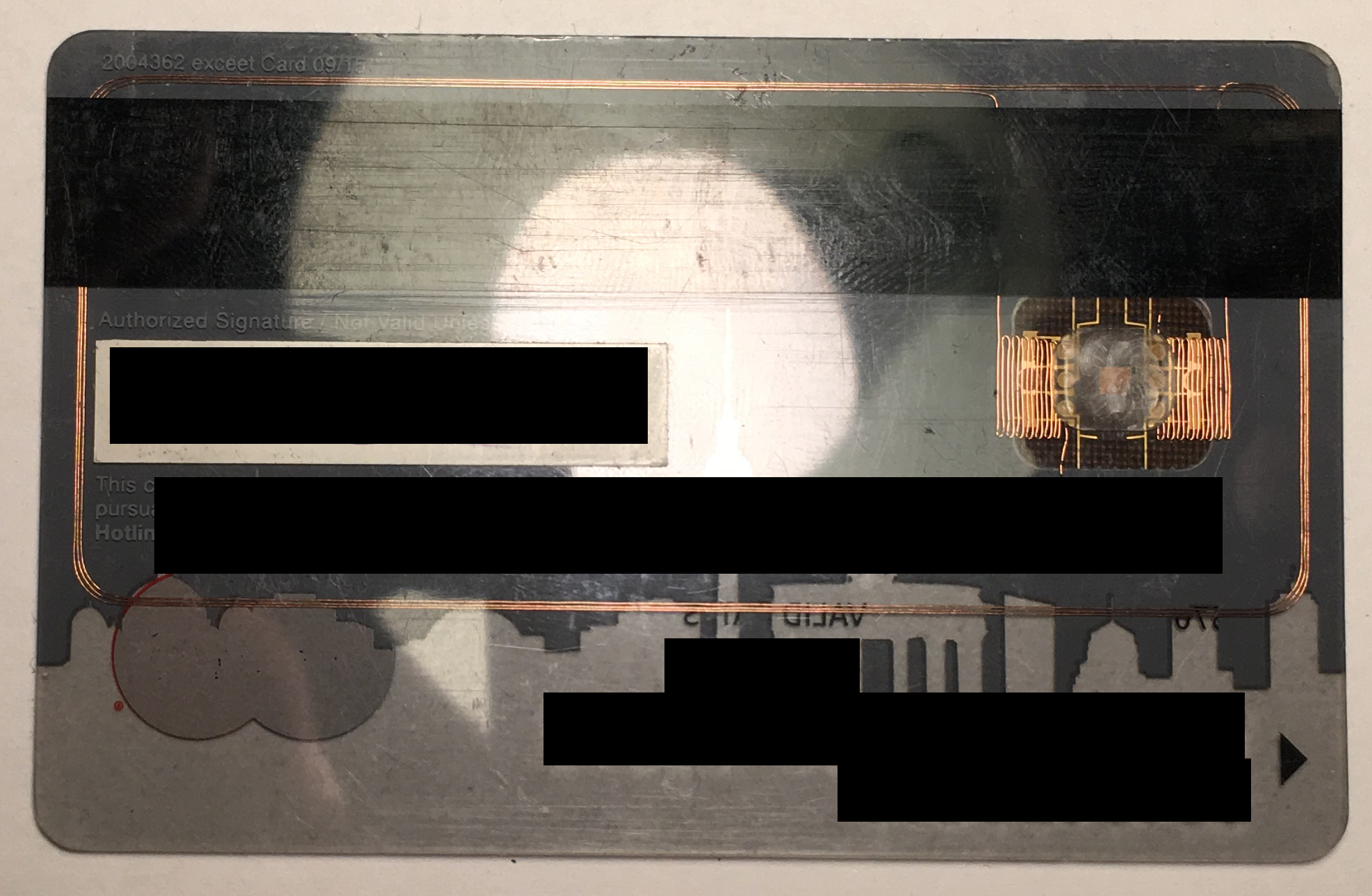 Rückseite einer Maestro International Karte mit sichtbarem EMV-Chip und NFC-Antenne